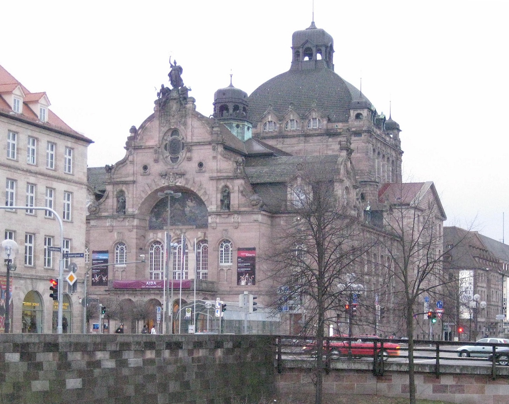 Opernnhaus Nürnberg (2009)